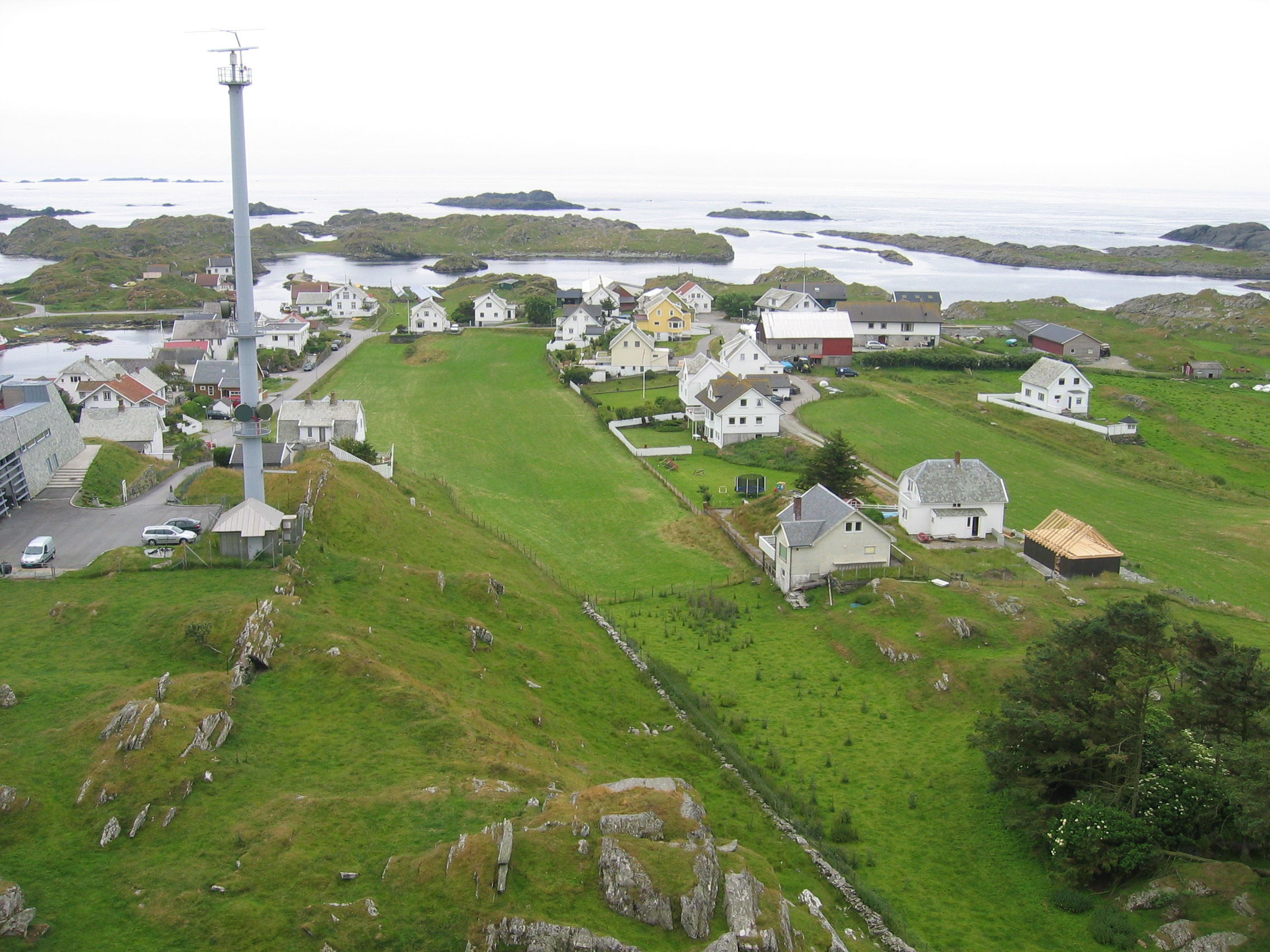 View over kvitsoey2